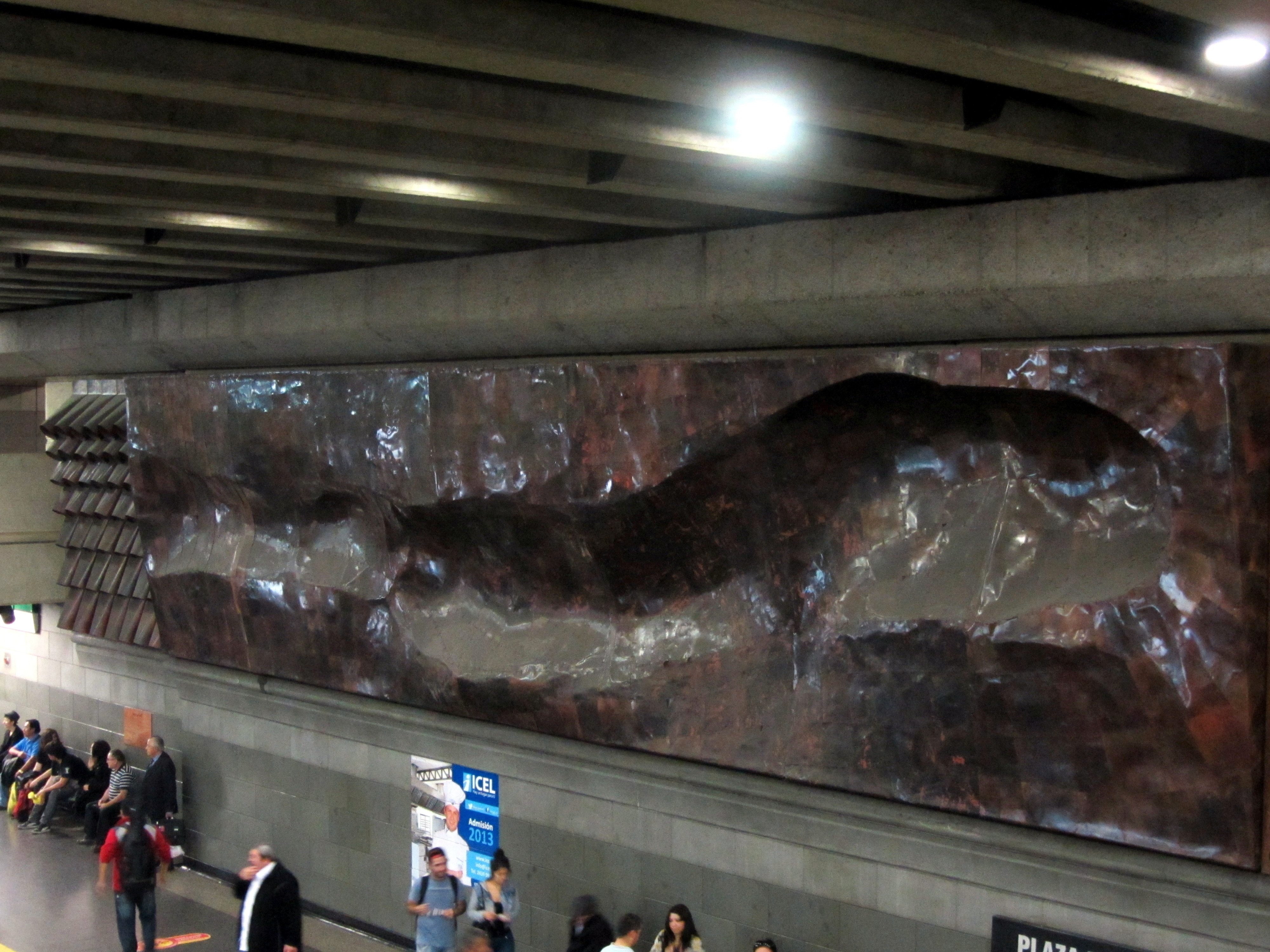 Mural escultórico en cobre (24 metros de largo por 3 de alto), obra de la escultora chilena Elisa Aguirre ubicada en el metro Plaza de Armas, Santiago de Chile.